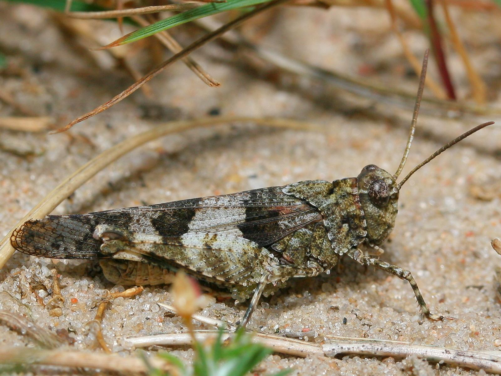 Blauflüglige Ödlandschrecke (Oedipoda caerulescens)